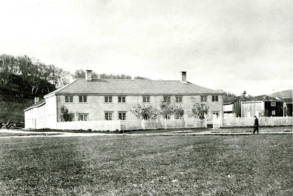 Bodin prestegård i Bodø, rundt 1890